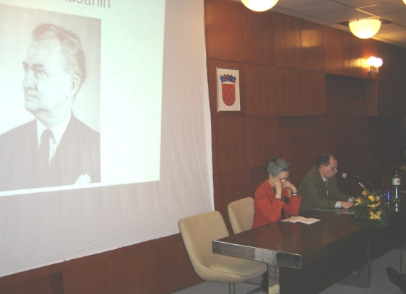 Tribina "Braća Kašanin", Beli Manastir, Mirovna grupa Oaza Beli Manastir, 25. III. 2006.